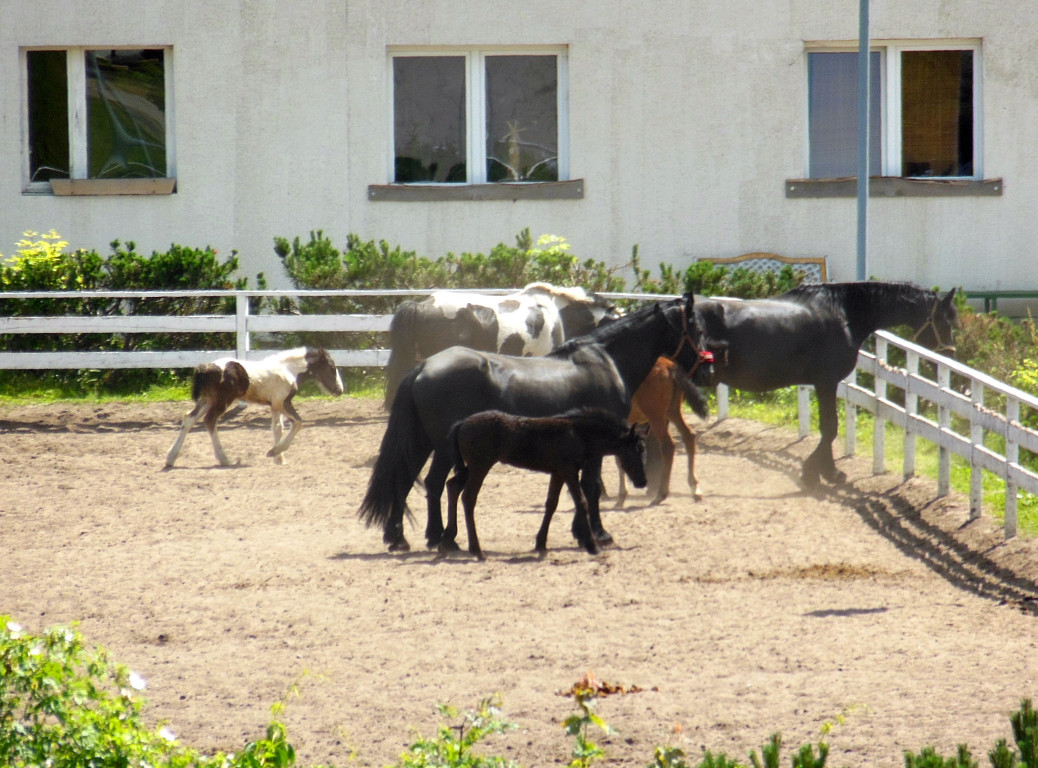 Stadnina koni na terenie Leśnego Parku Kultury i Wypoczynku "Myślęcinek" w Bydgoszczy